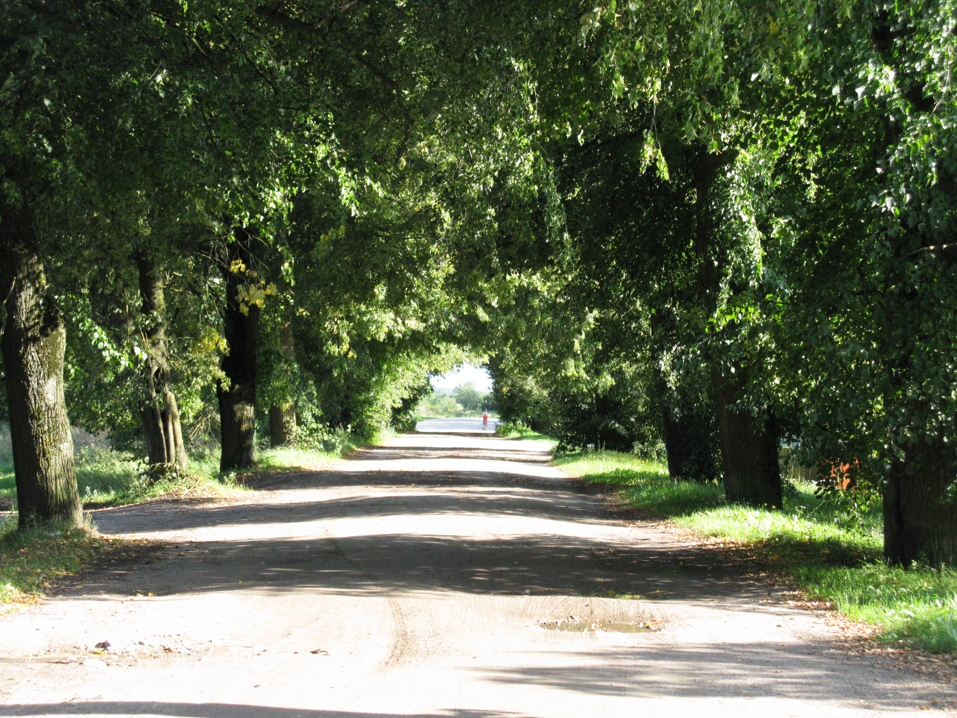 деревня Сыроватки летом 2013 rода, на фото улица Центральная